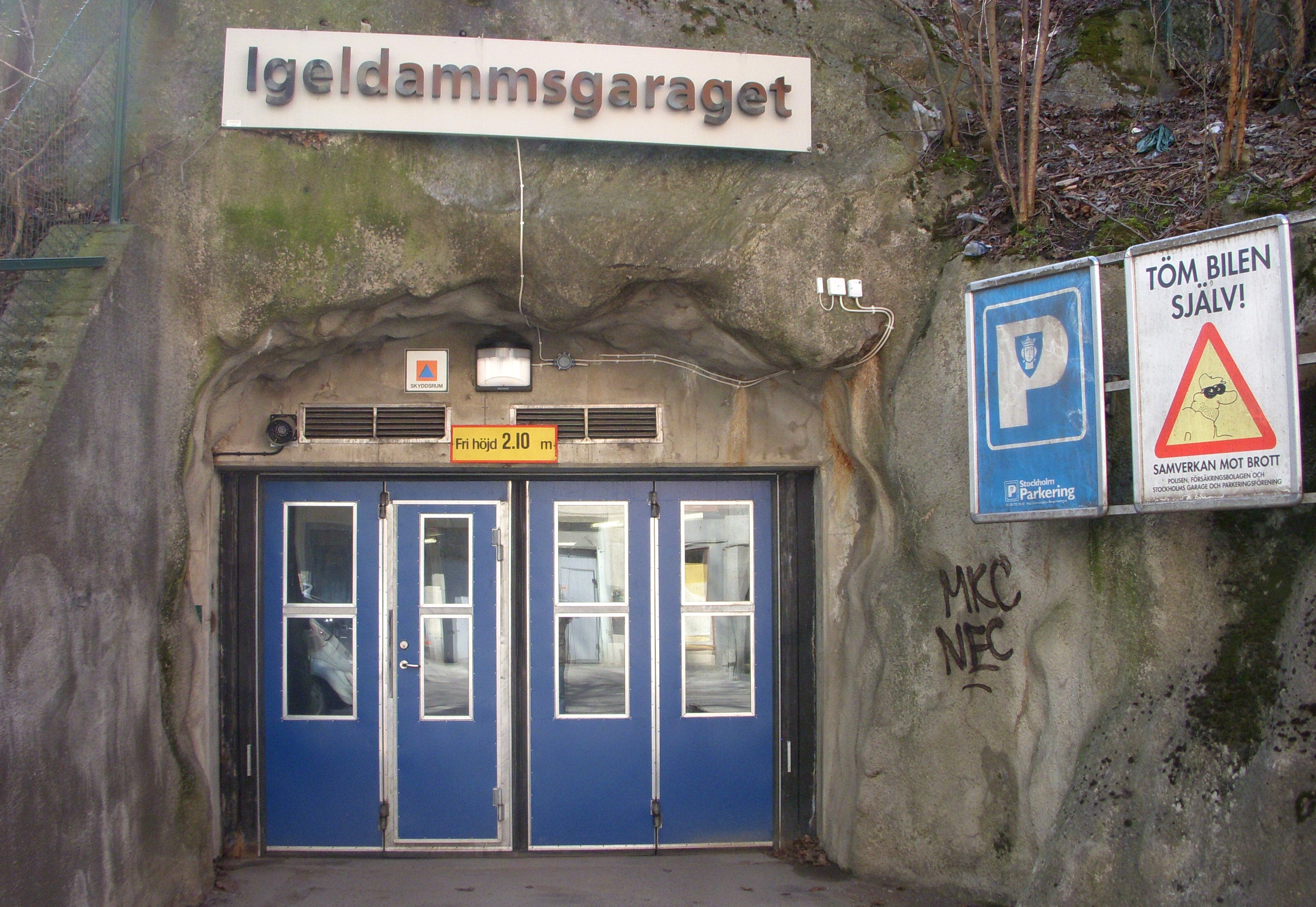 Igeldammsgaraget, P-garage och skyddsrum på Kungsholmen